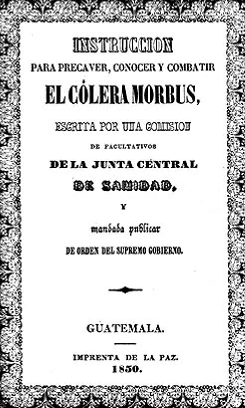 Manual para contrarrestar la epidemia del Cholera Morbus en Guatemala, 1850.